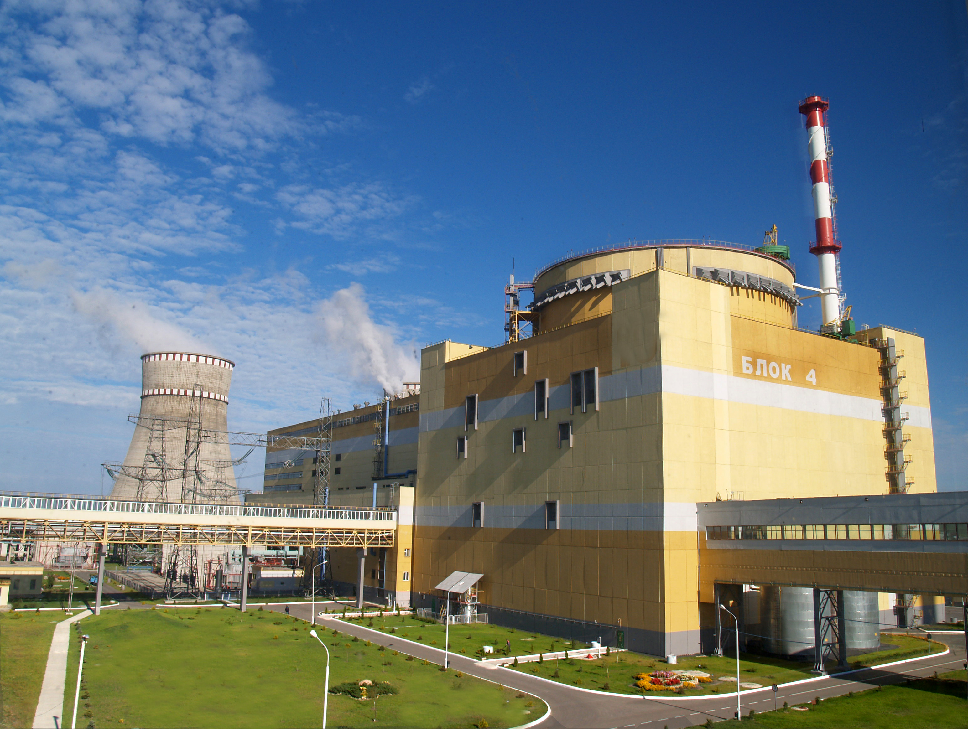 Четвертый блок Ровенской АЭС. Украина.